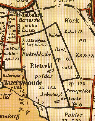 Rietveldse_polder_onder_Hazerswoude